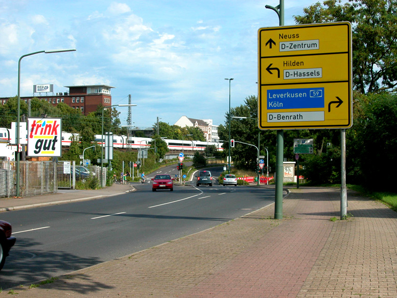 Die Straße «Bayreuther Straße» in Benrath, Düsseldorf